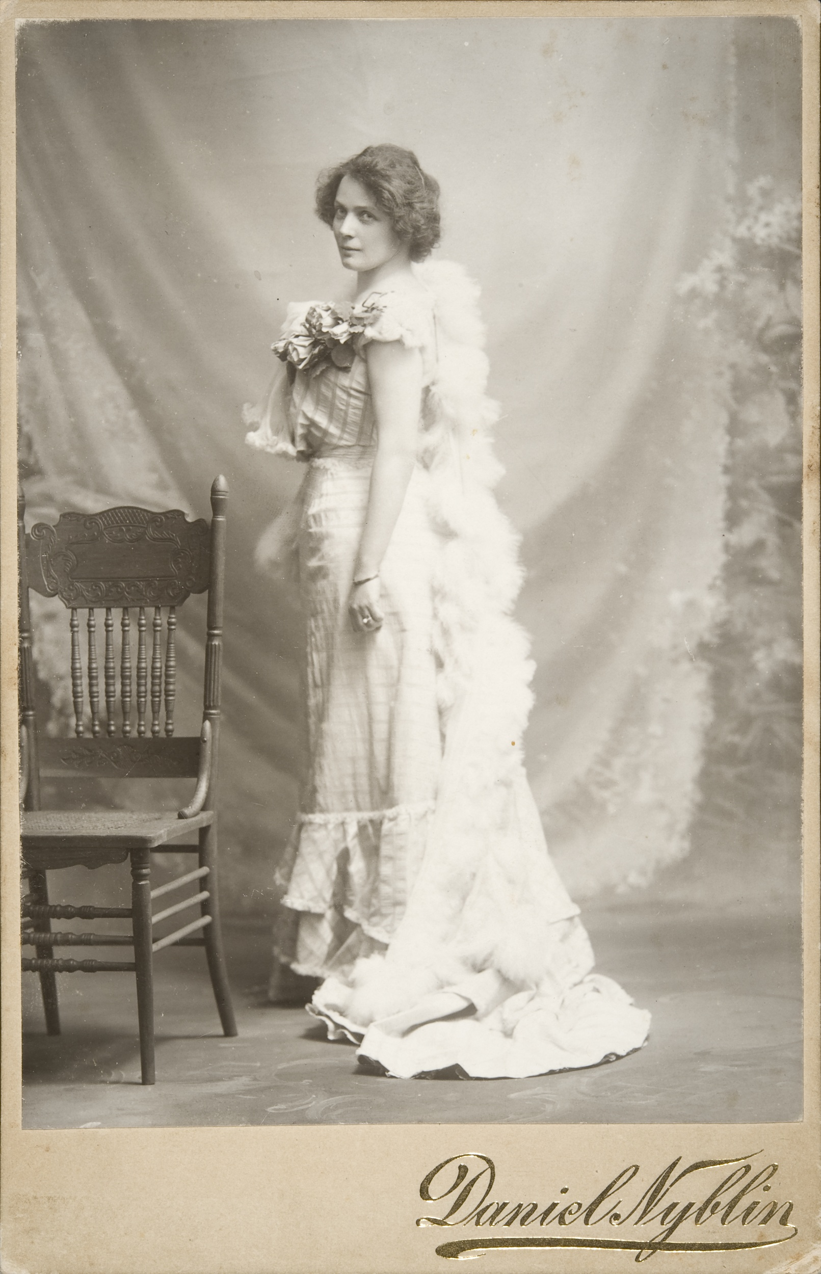 Kansallisteatterin näyttelijä Helmi Lindelöf; Helmi Lindelöf pysty, mustavalkoinen